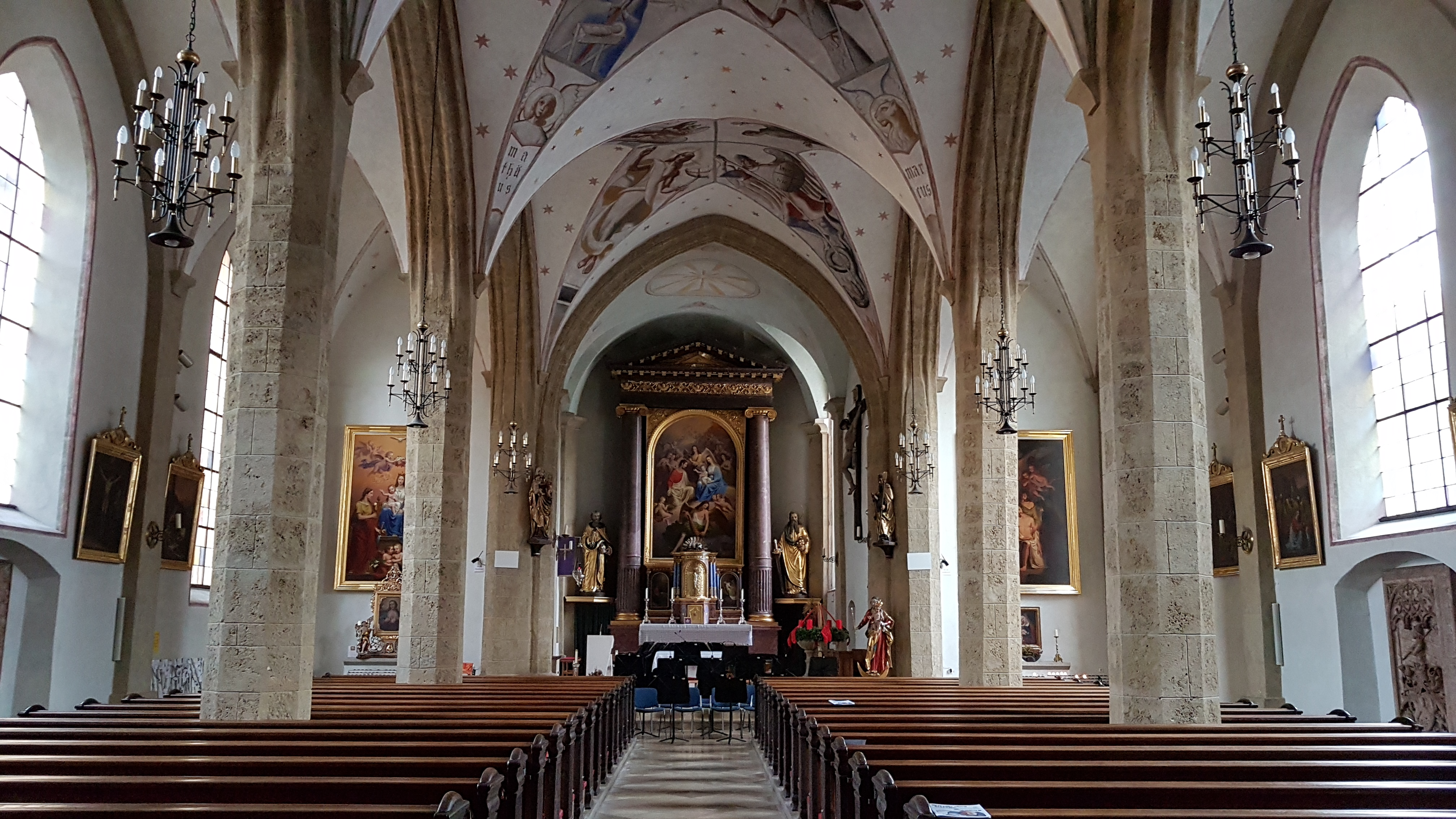 Pfarrkirche St. Vitus Kufstein